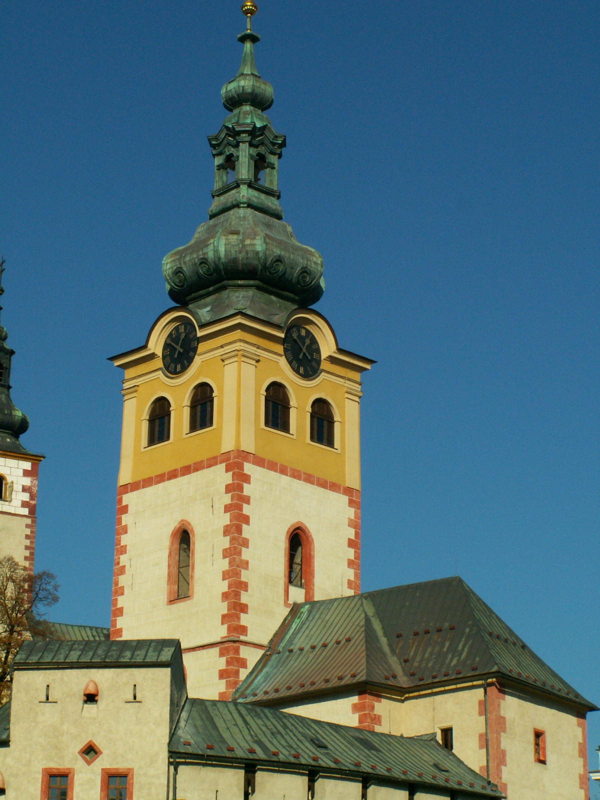 Hrad Barbakan (detail na vežu)